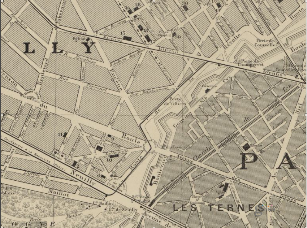 extrait Titre : Nouveau Plan de Neuilly-sur-Seine et de Levallois-Perret / dressé par Pierre Aznavour, 1884 Auteur : Aznavour, Pierre (18..-19..?). Auteur du texte Éditeur : imp. de Chaix (Paris) Date d'édition : 1884 gallica ark:/12148/btv1b8439151b